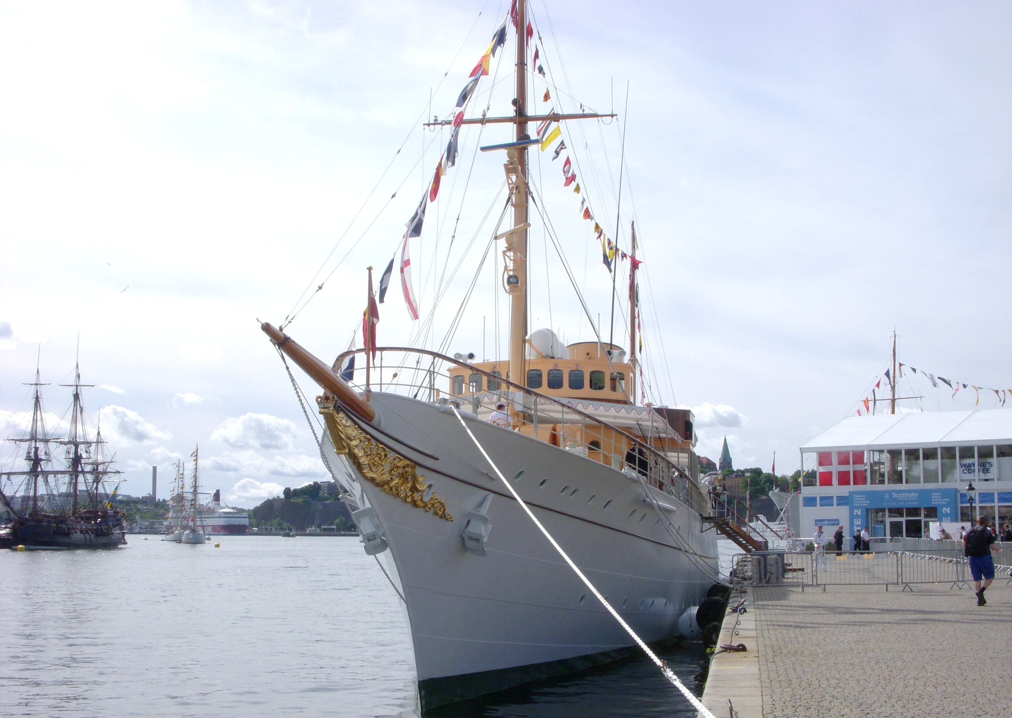 Dannebrogen i Stockholm i samband med kungliga bröllopet